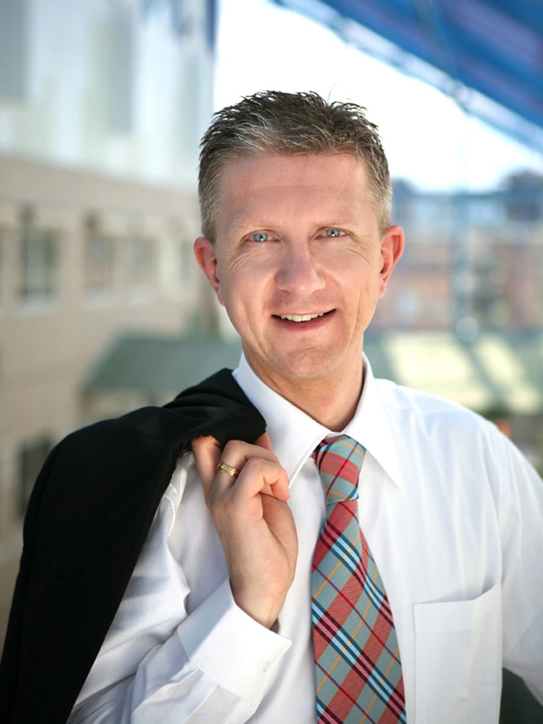 Magnus Olofsson